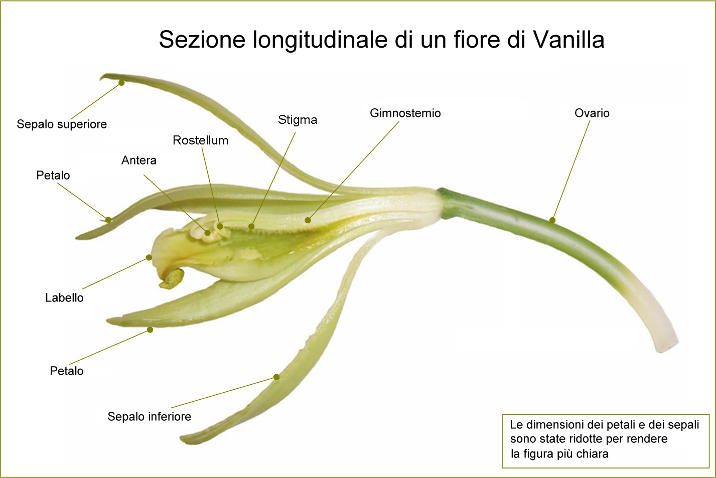 Sezione longitudinale di un fiore di Vanilla